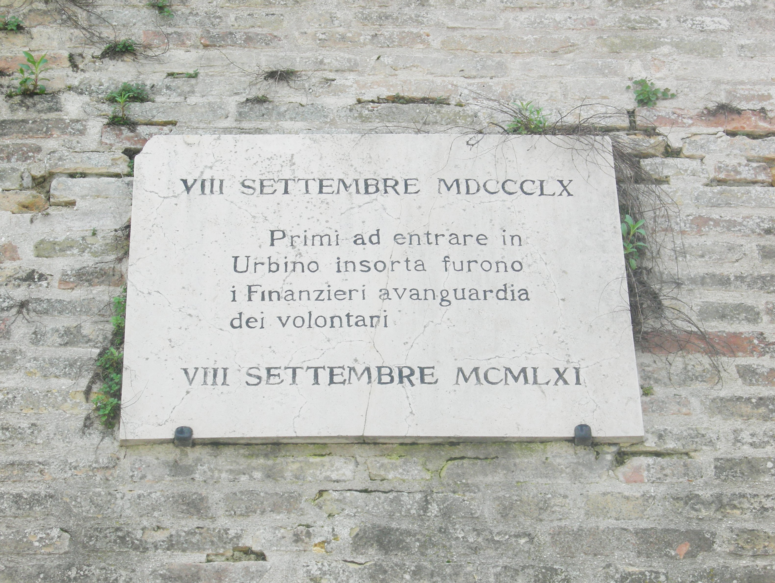 Lapide commemorativa dell'ingresso, in Urbino, delle prime truppe piemontesi.